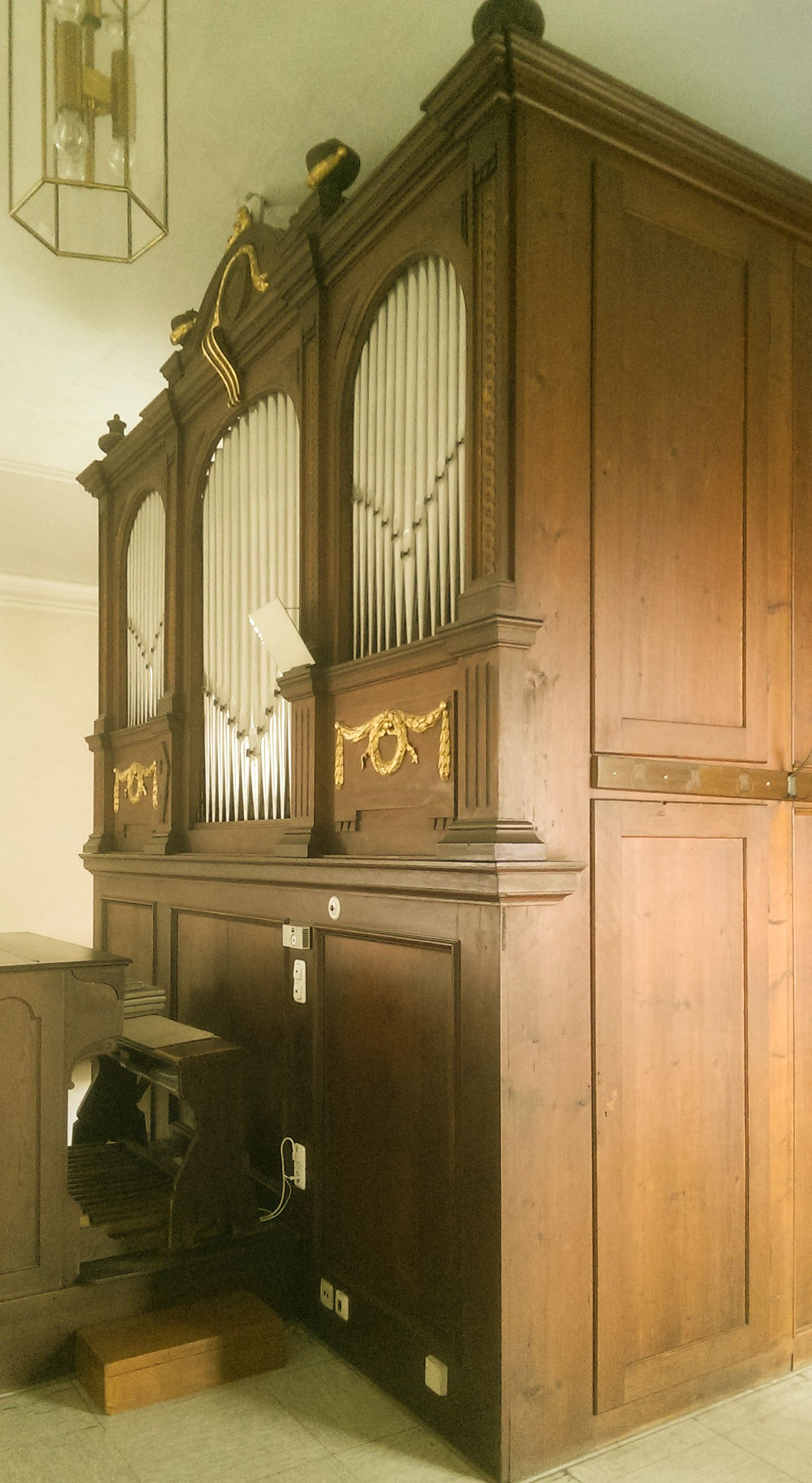 Kirche "Mariä Geburt in Windheim: Schlimbach-Orgel